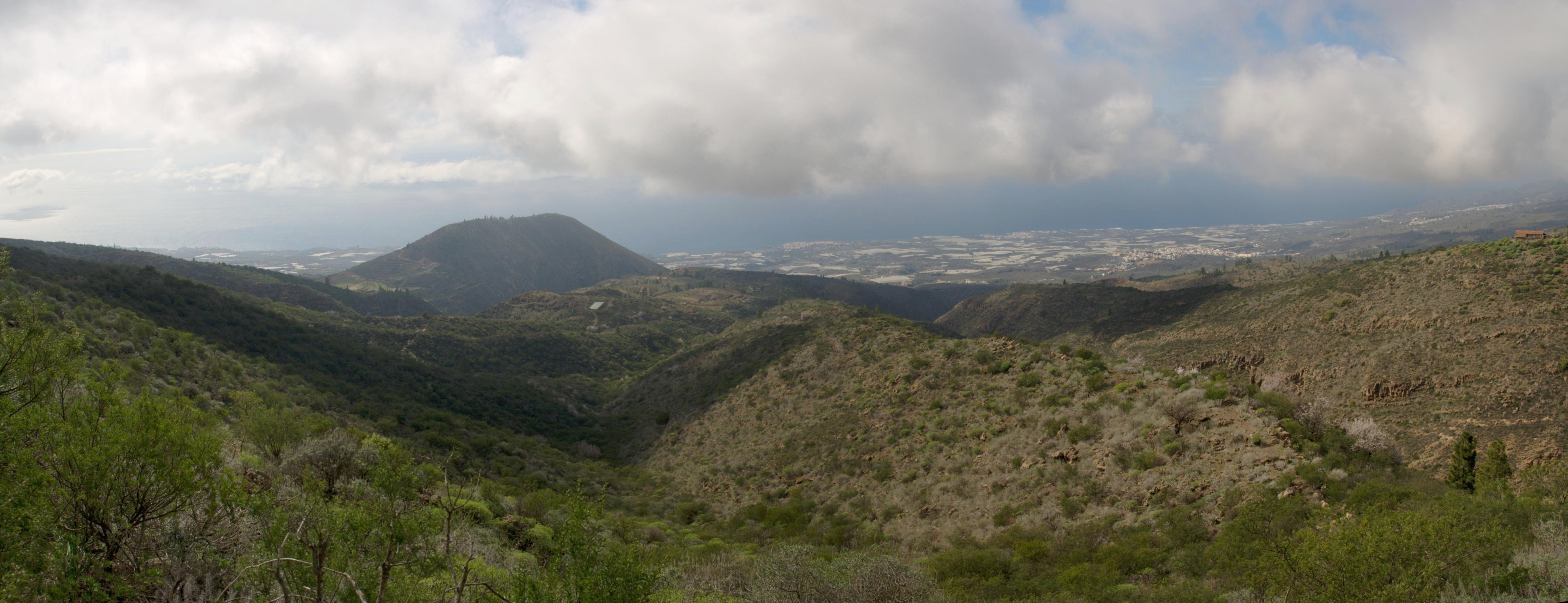 La Montaña de Tejina, las Fuentes y el Choro. A la derecha Guía de Isora.